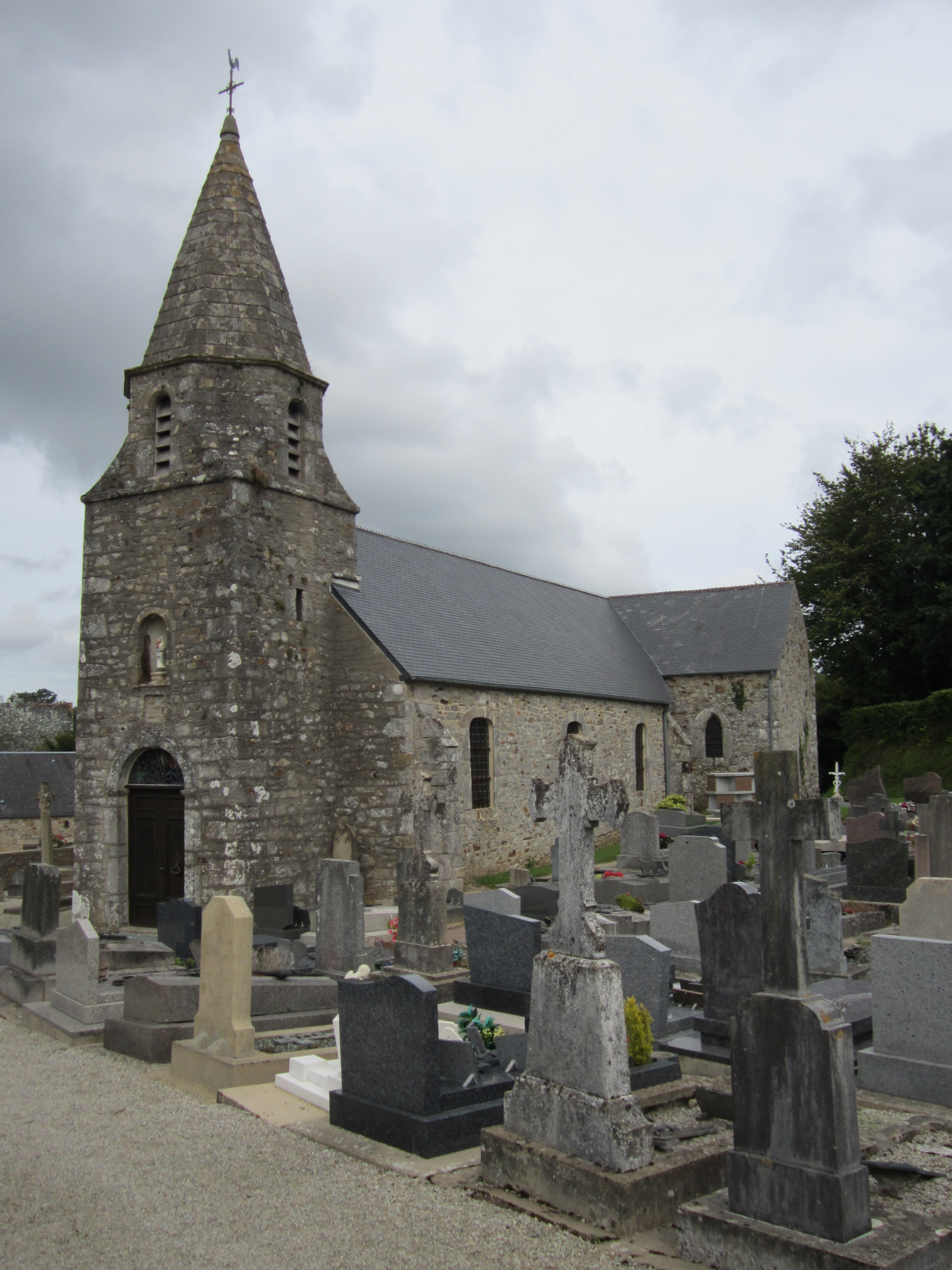 église Saint-Christophe de Saint-Christophe-du-Foc